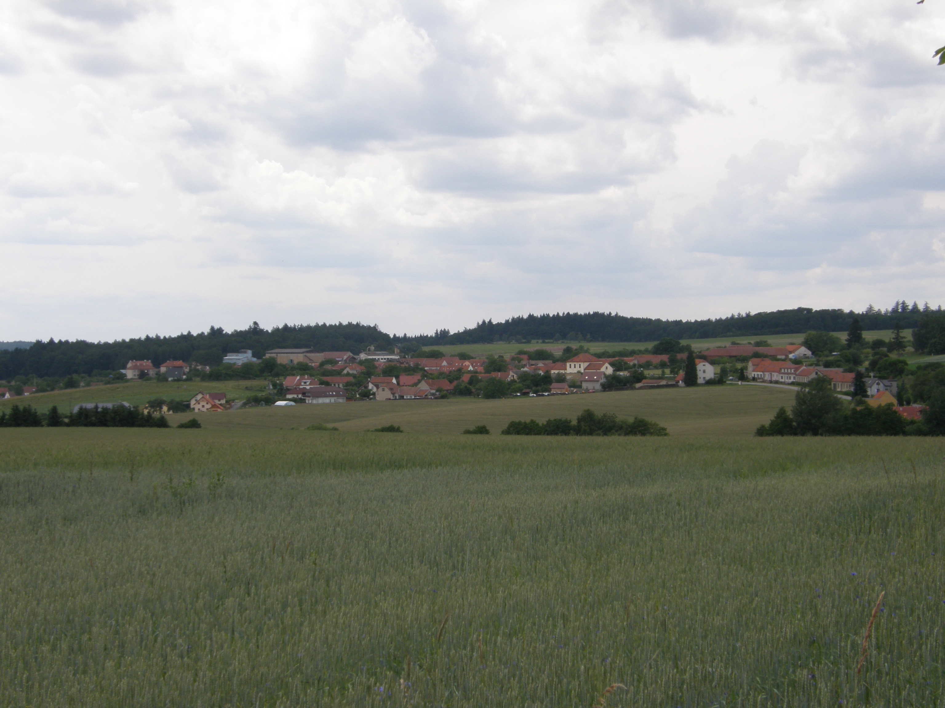 Bukovina